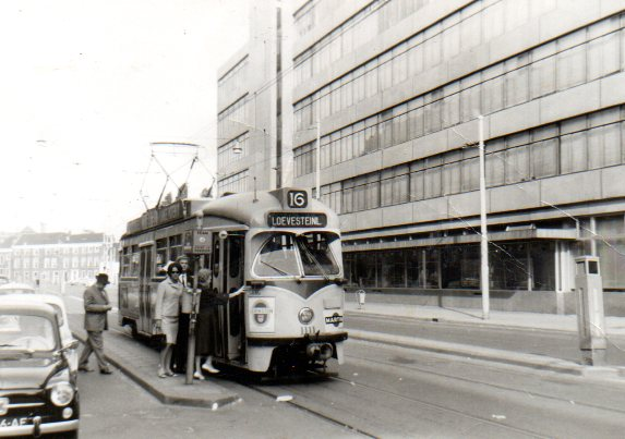 PCC-car aan de Kalvermarkt in Den Haag, 1965